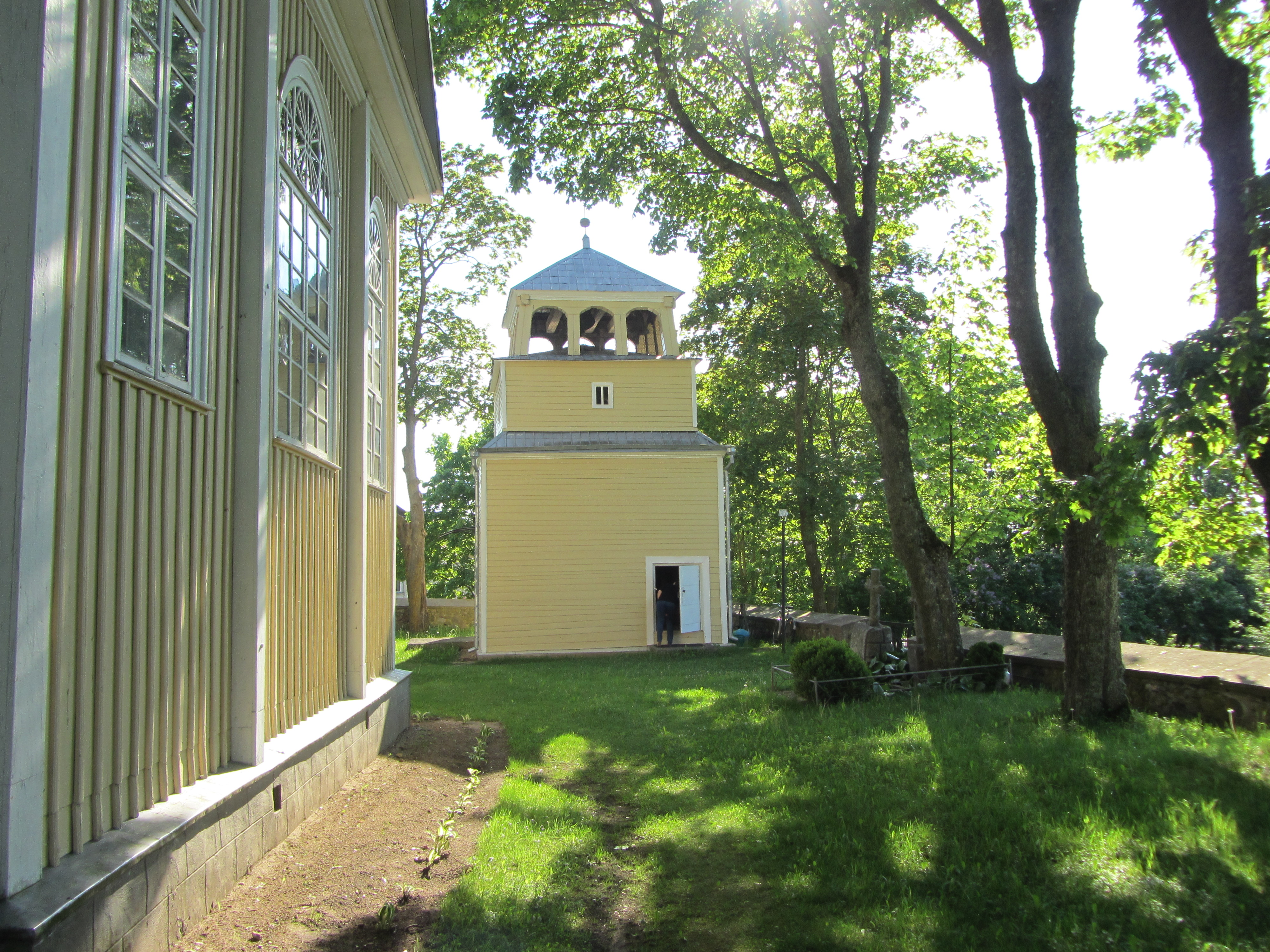 Suginčiai, Lithuania